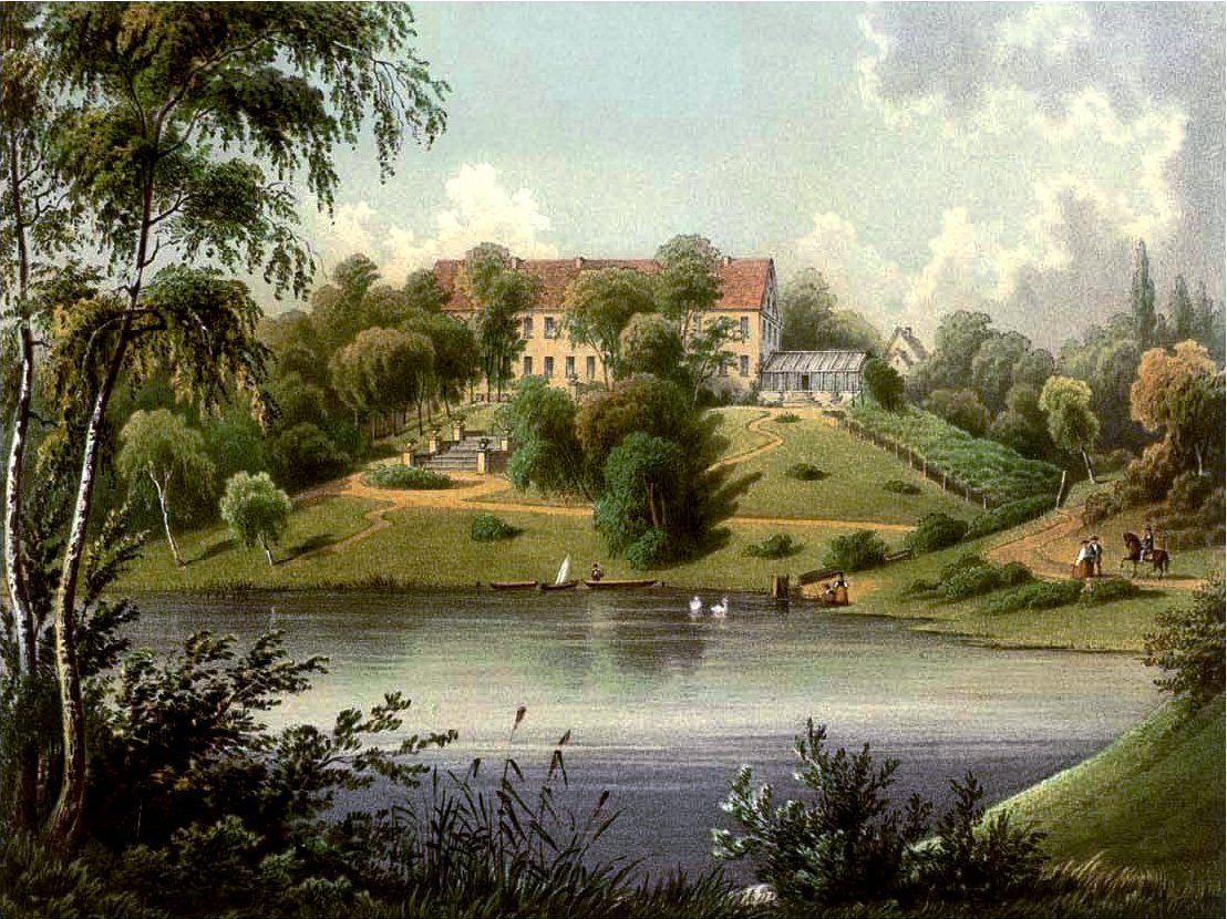 Gut Charlottenhof, Kreis Landsberg, Provinz Brandenburg, Lithografie aus dem 19. Jahrhundert